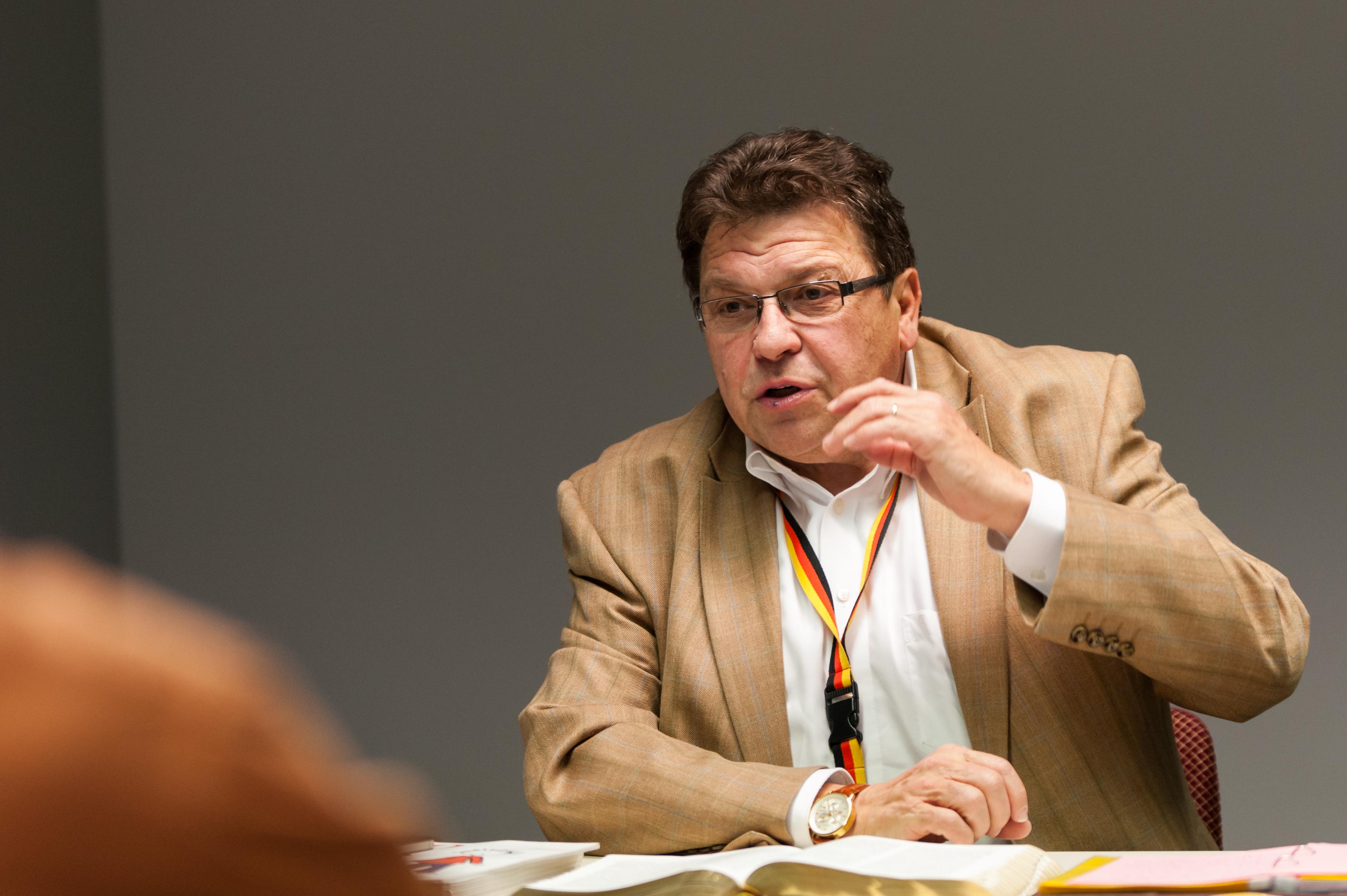 Wolfgang Baake bei seinem Seminar "Politik - (k)ein schmutziges Geschäft" Dieses Foto darf ohne Einschränkungen bei Namensnennung (SPRING / Nico Franz) verwendet werden.